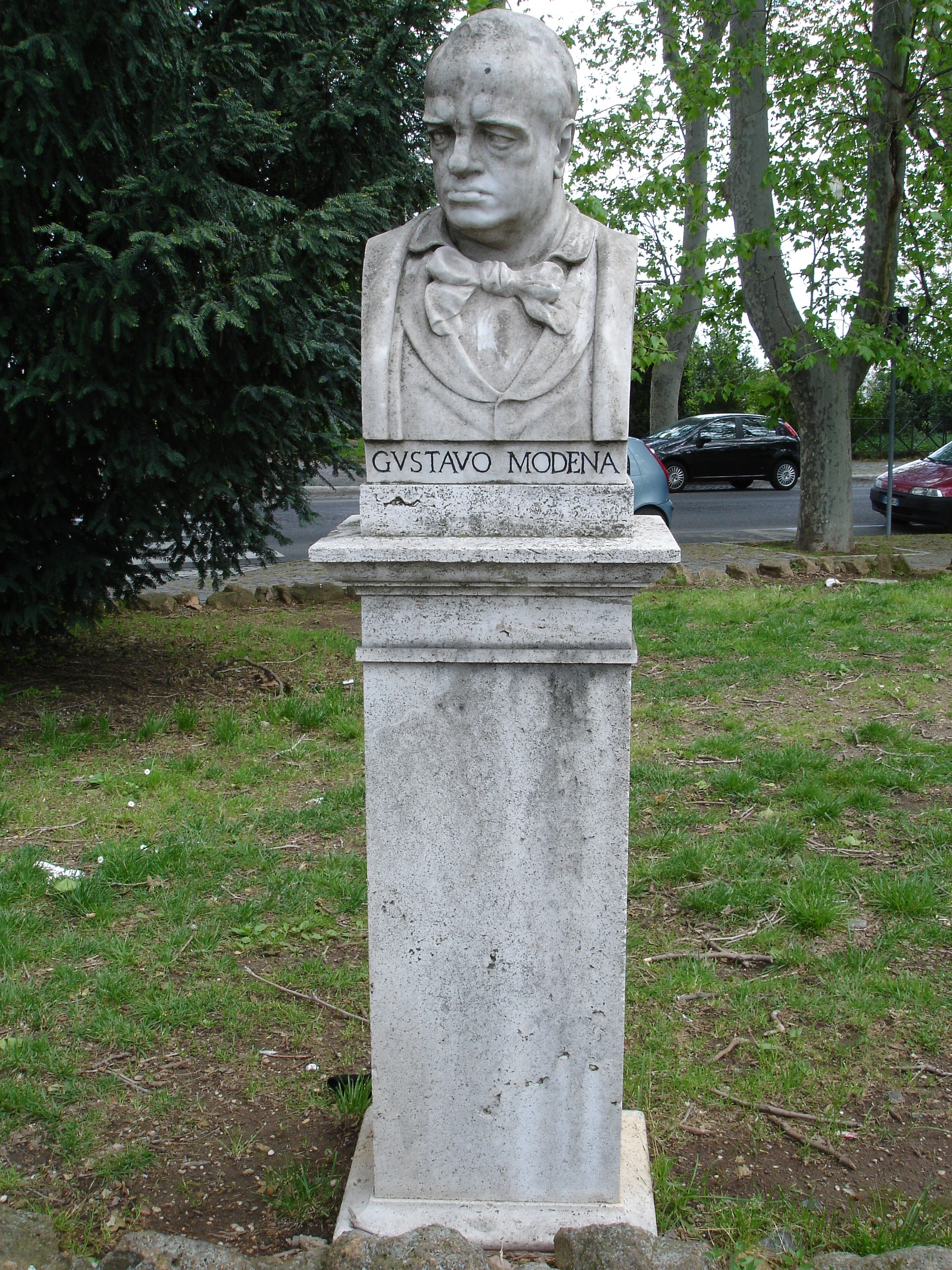 Busto di Gustavo Modena (Venezia 1803 - Torino 1861) sul Gianicolo, a Roma. Foto scattata da F. Fullone. Original uploader was Fullo88 at it.wikipedia.